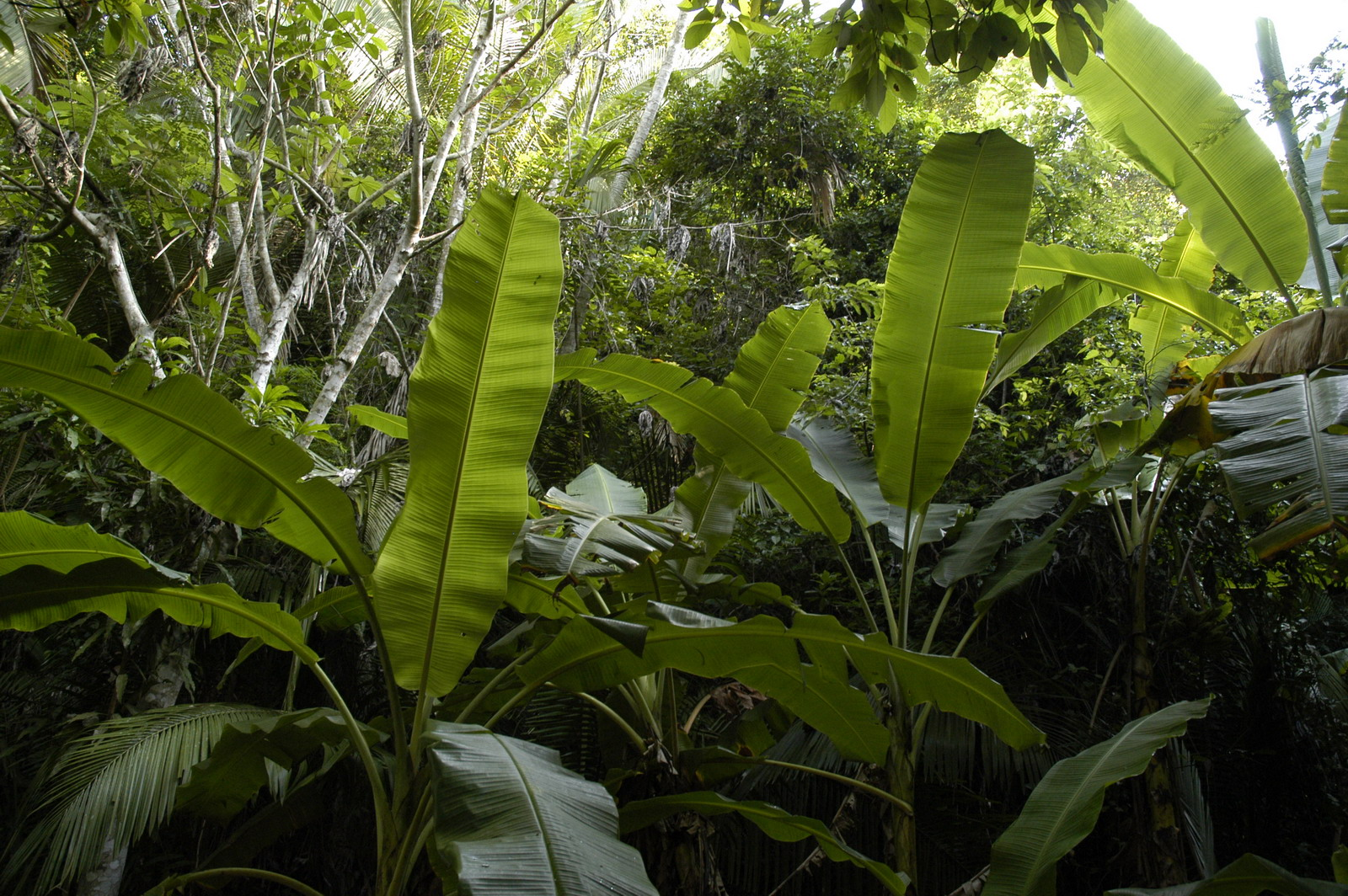 Sierra Madre - inside of jungle Autor: Perojevic